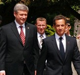 Harper adn Sarkozy